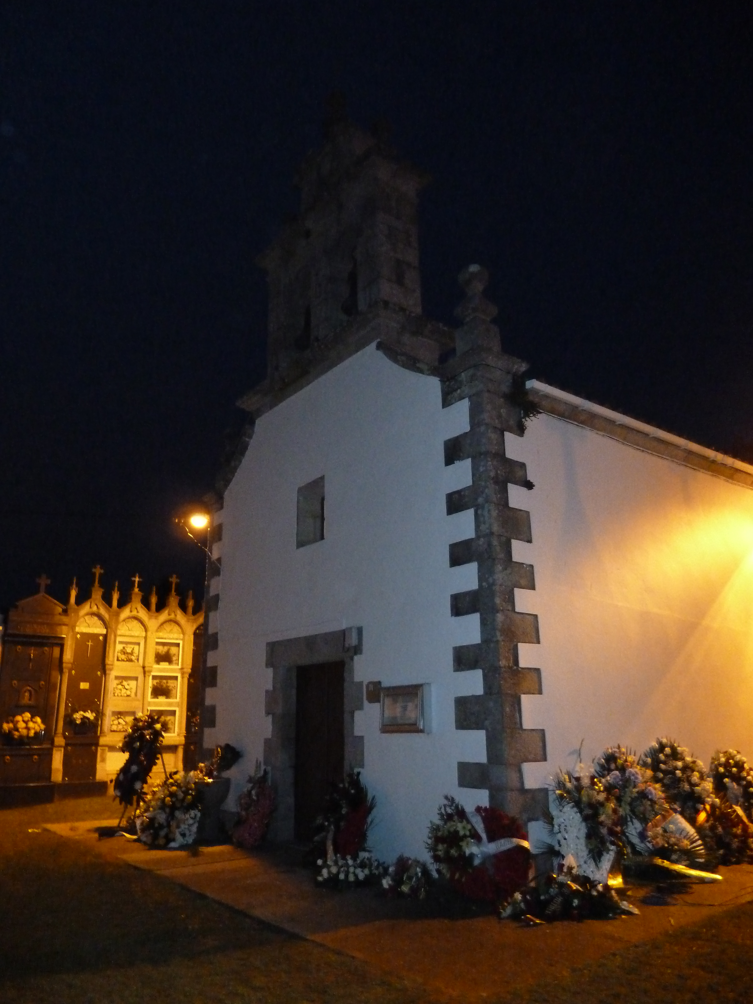 Enterro Fraga Perbes